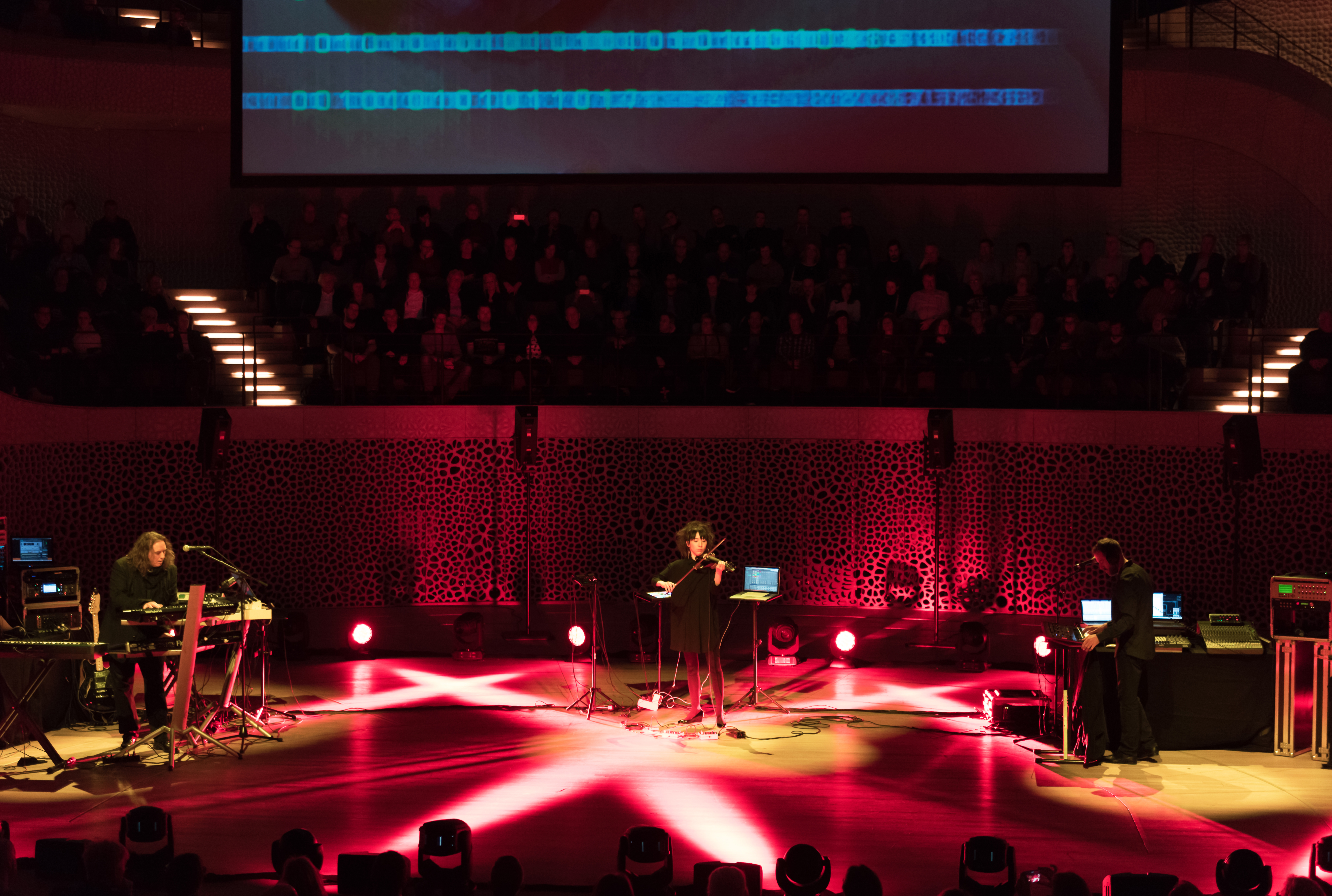 Tangerine Dream bei der Quantum of Electronic Evolution Tour in der Elbphihamonie Hamburg 2018